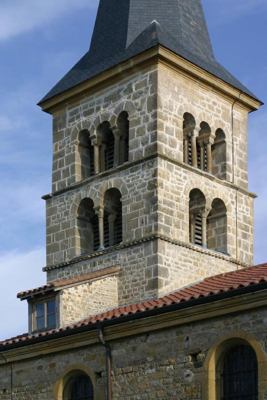 Clocher de l'église de Fleury-la-Montagne